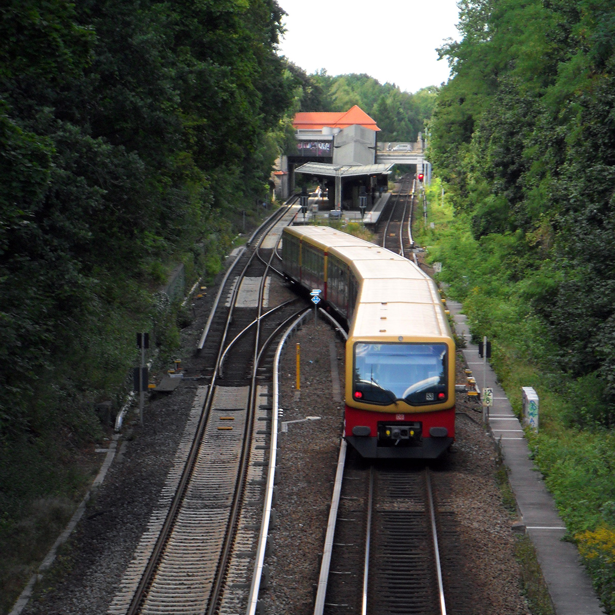 Einfahrender S-Bahn-Zug am Bahnhof Berlin-Frohnau.